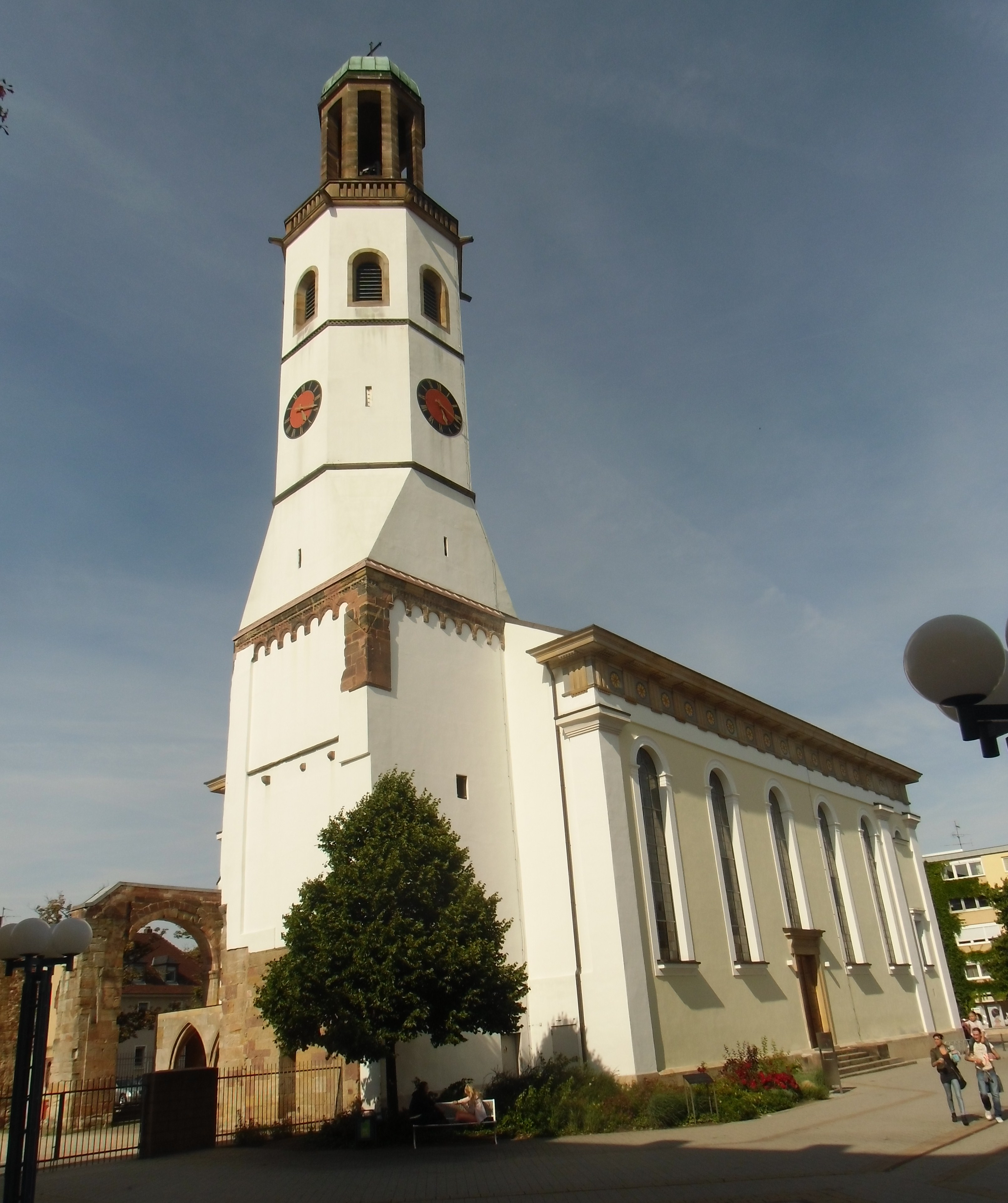 Evangelische Stadtkirche in Frankenthal, erbaut 1820-1823